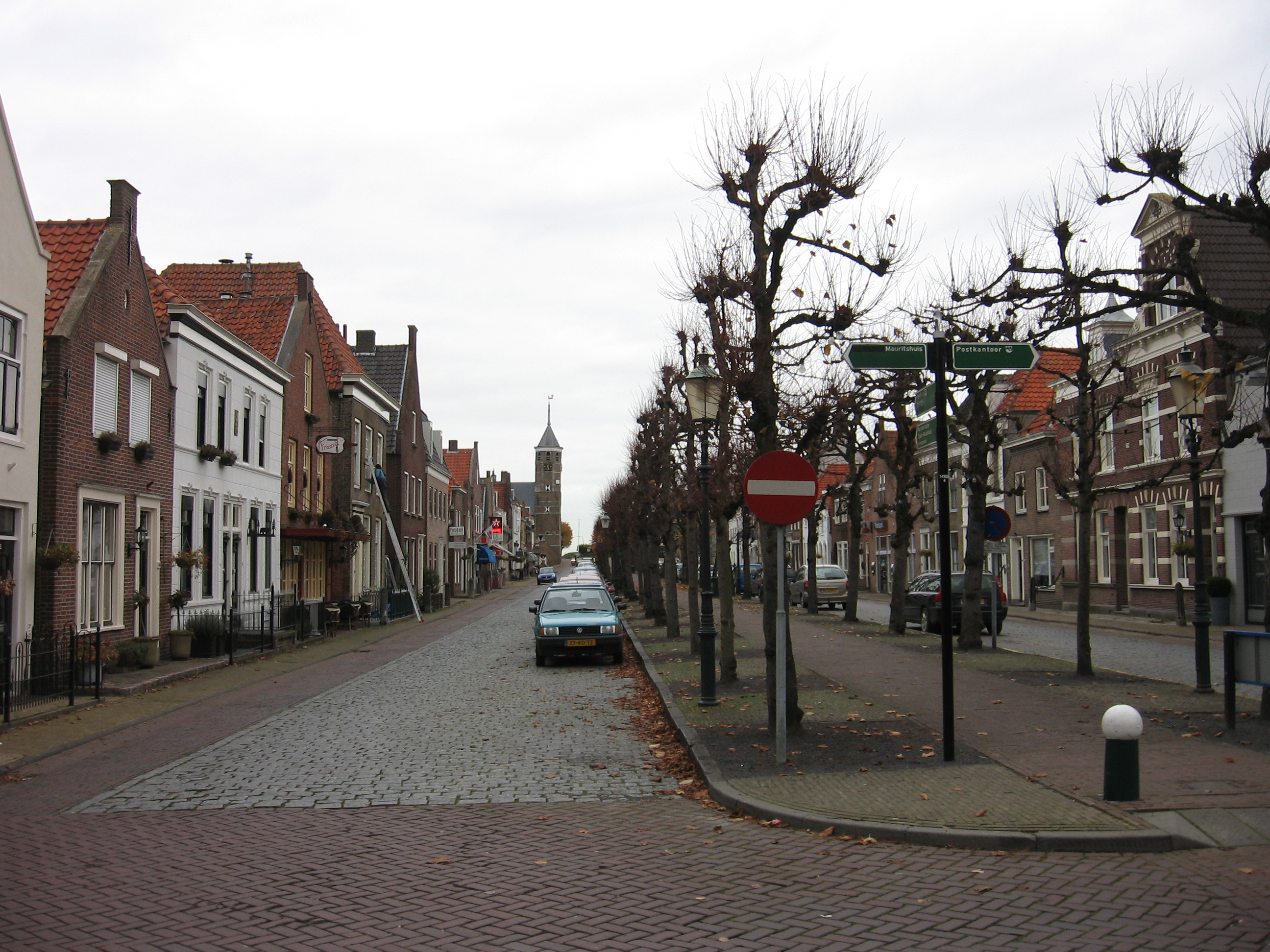 Zicht op een deel van de Voorstraat t.o. Koepelkerk in Willemstad